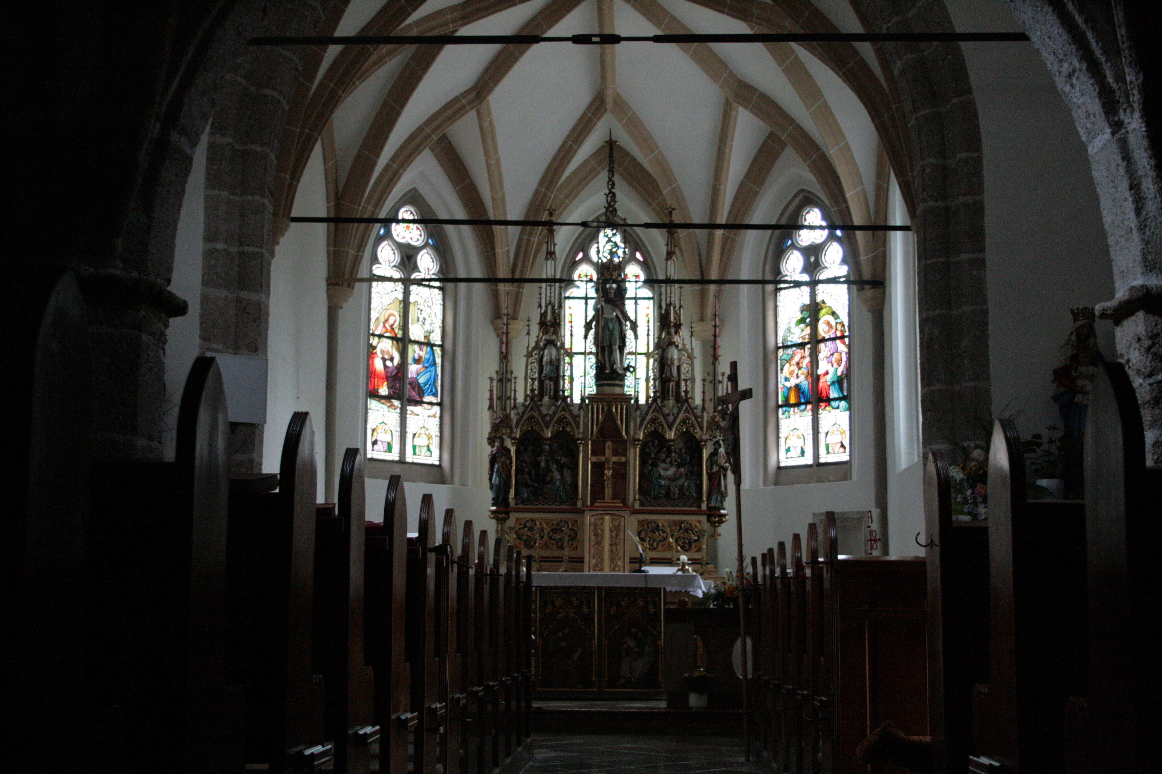 St. Georgen am Reith, Niederösterreich, Austria Inneres der Pfarrkirche St. Georgen am Reith